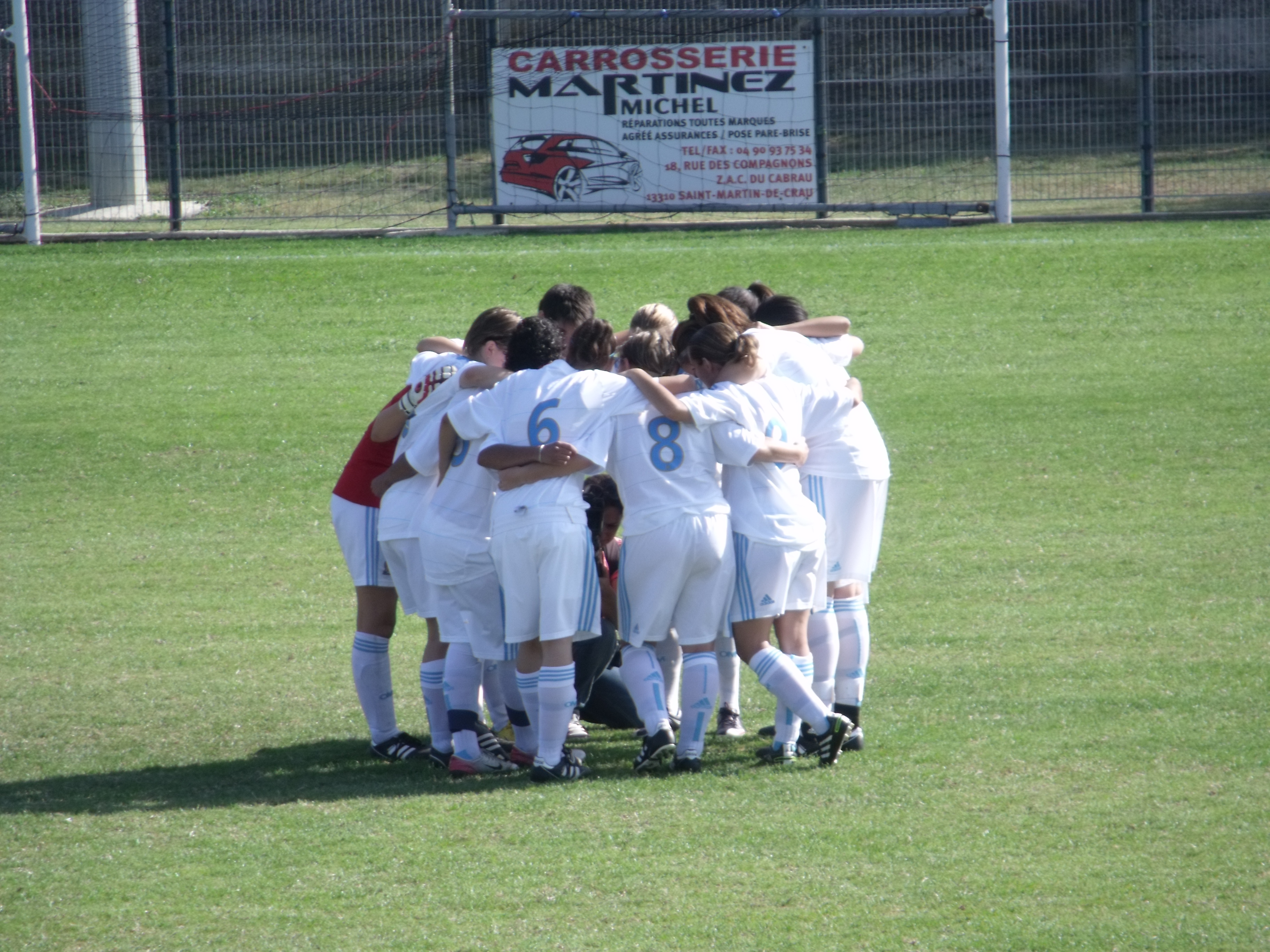 Match Saint-Martin-de-Crau-OM féminines 16/10/2011